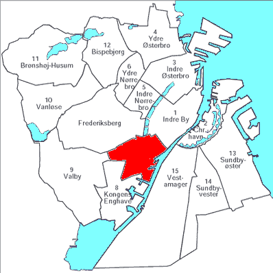 zelf gemaakt